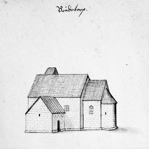 Broddetorps gamla kyrka kyrka, teckning av Johan Peringskiöld ur hans skrift Monumenta (1710-talet).